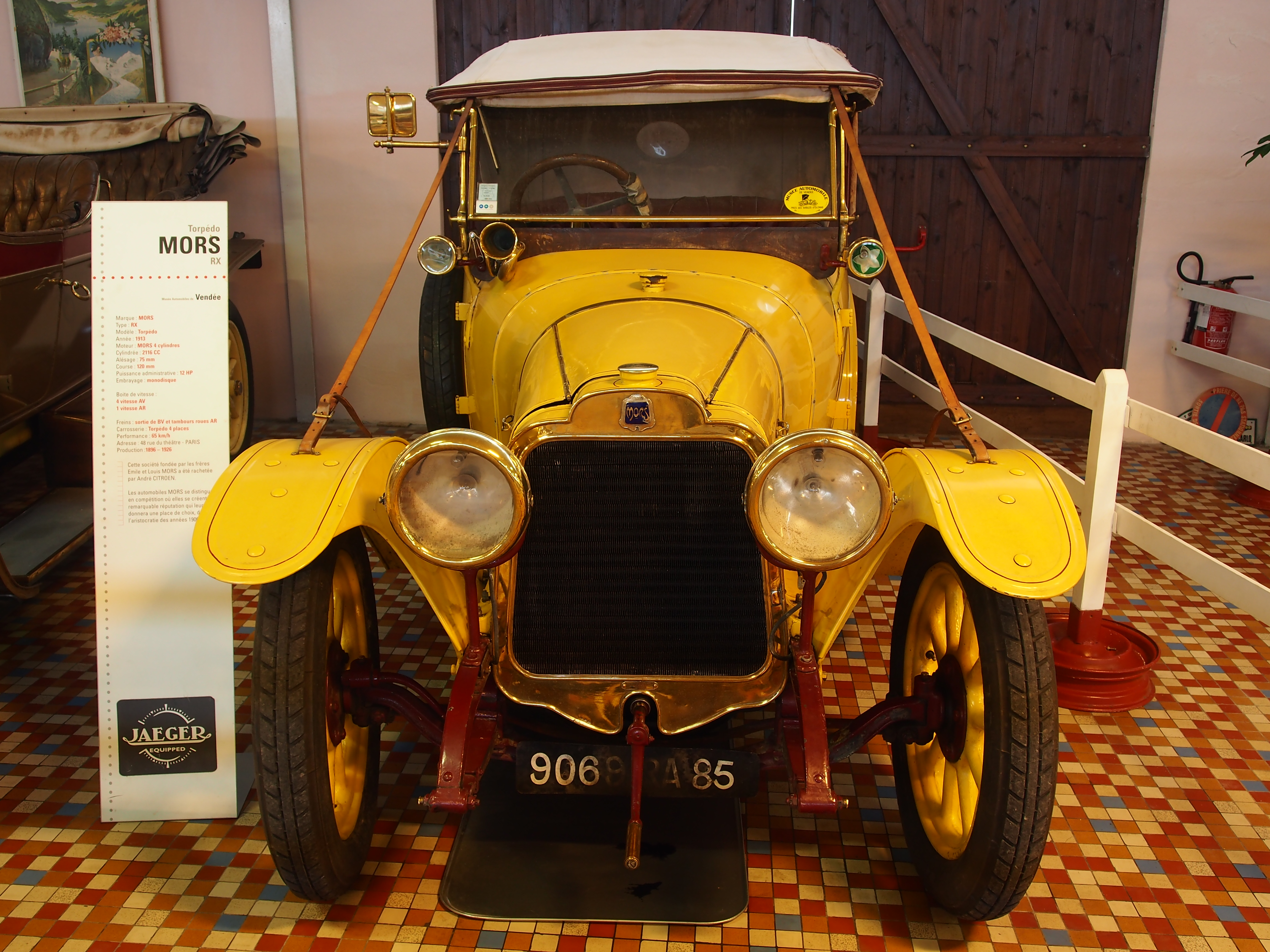 Mors 12 CV Type RX torpedo 4 places 1913 4-cylinders, 2116 ccPhotographed at the Musée Automobile de Vendée, France.